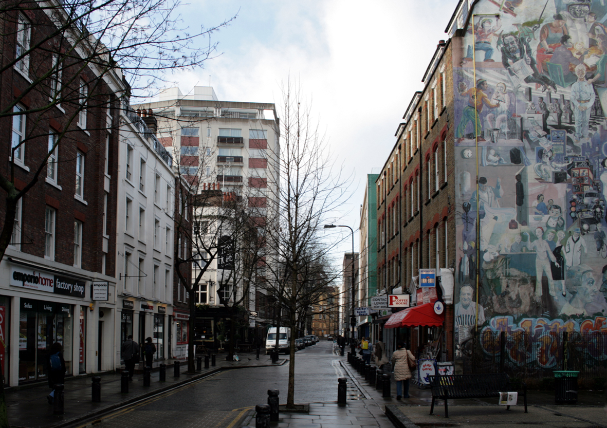 Tottenham Street, Fitzrovia, Camden, London.